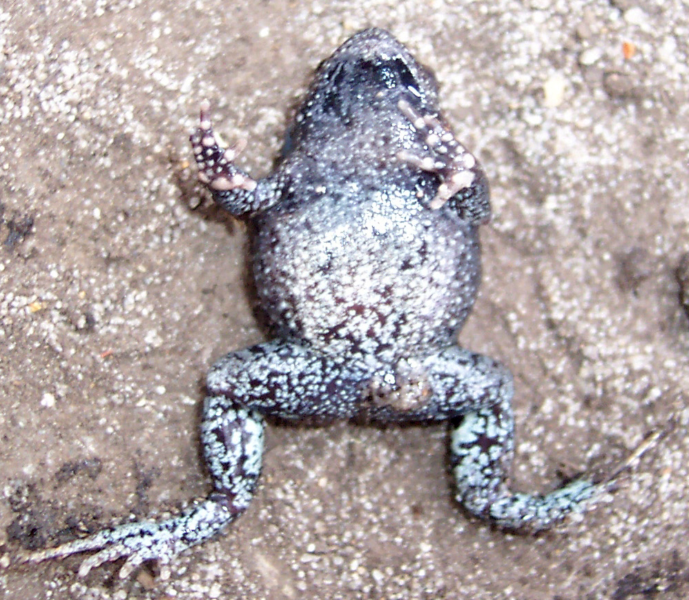 Nouvelle version de File:Uperoleia fusca underbelly.jpg (rectification des niveaux)